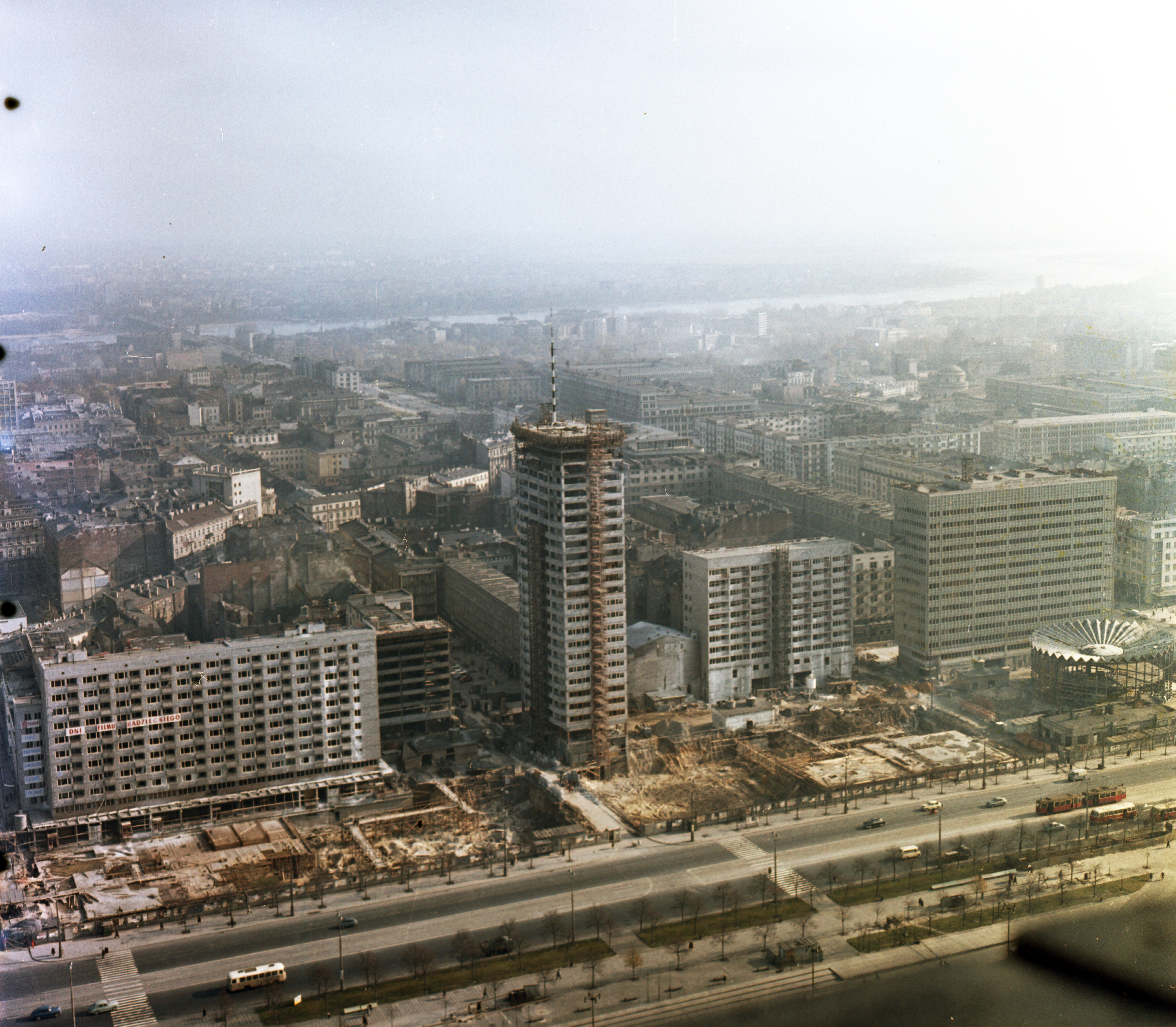 kilátás délkelet felé a Kultúra és Tudomány Palotájából. Location: Poland, Warsaw Tags: colorful, picture Title: kilátás délkelet felé a Kultúra és Tudomány Palotájából.